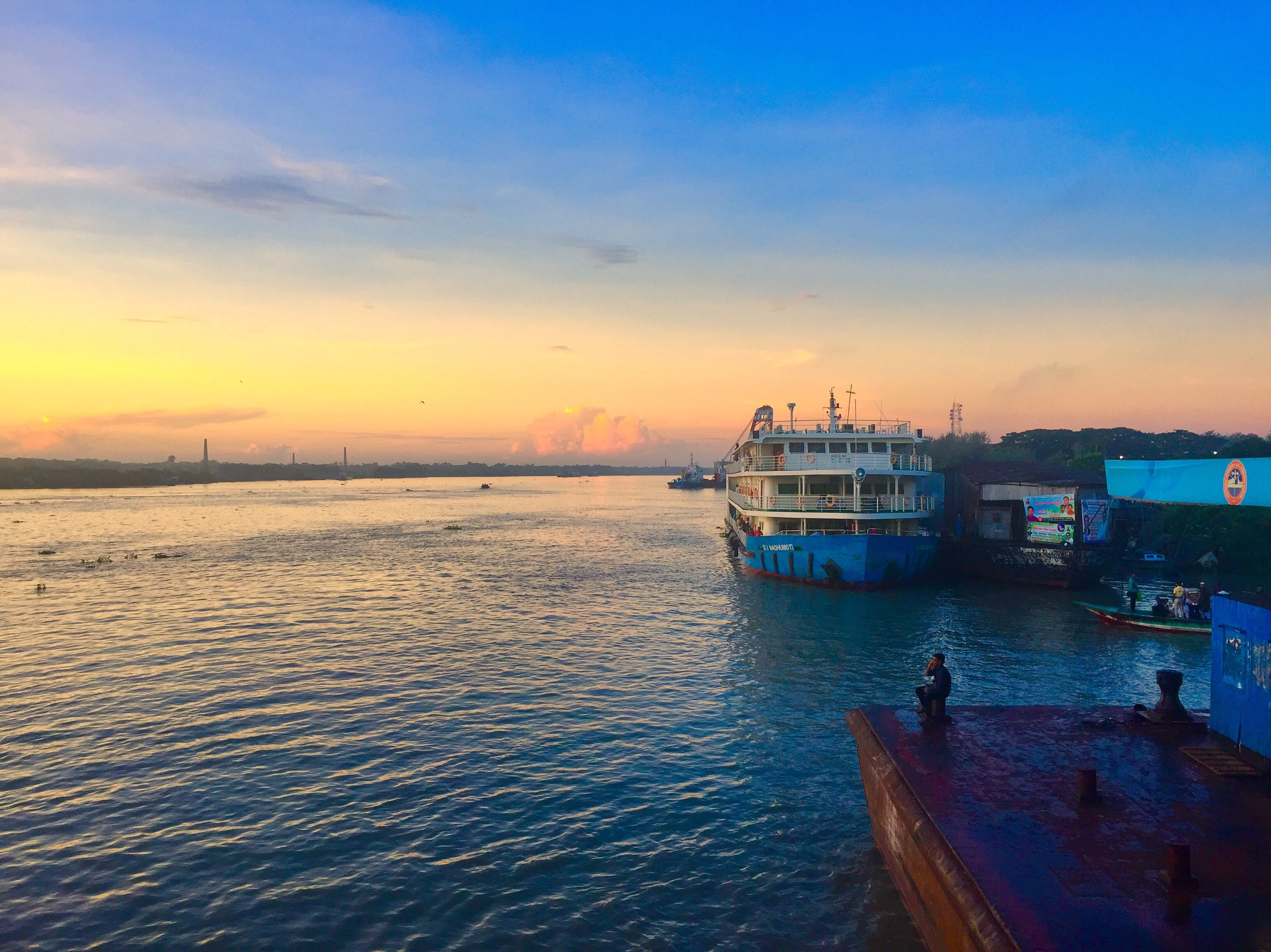 Kirtankhola River, Barisal